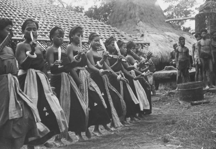 negatief. Vrouwendans ter gelegenheid van de bouw van een nieuw huis